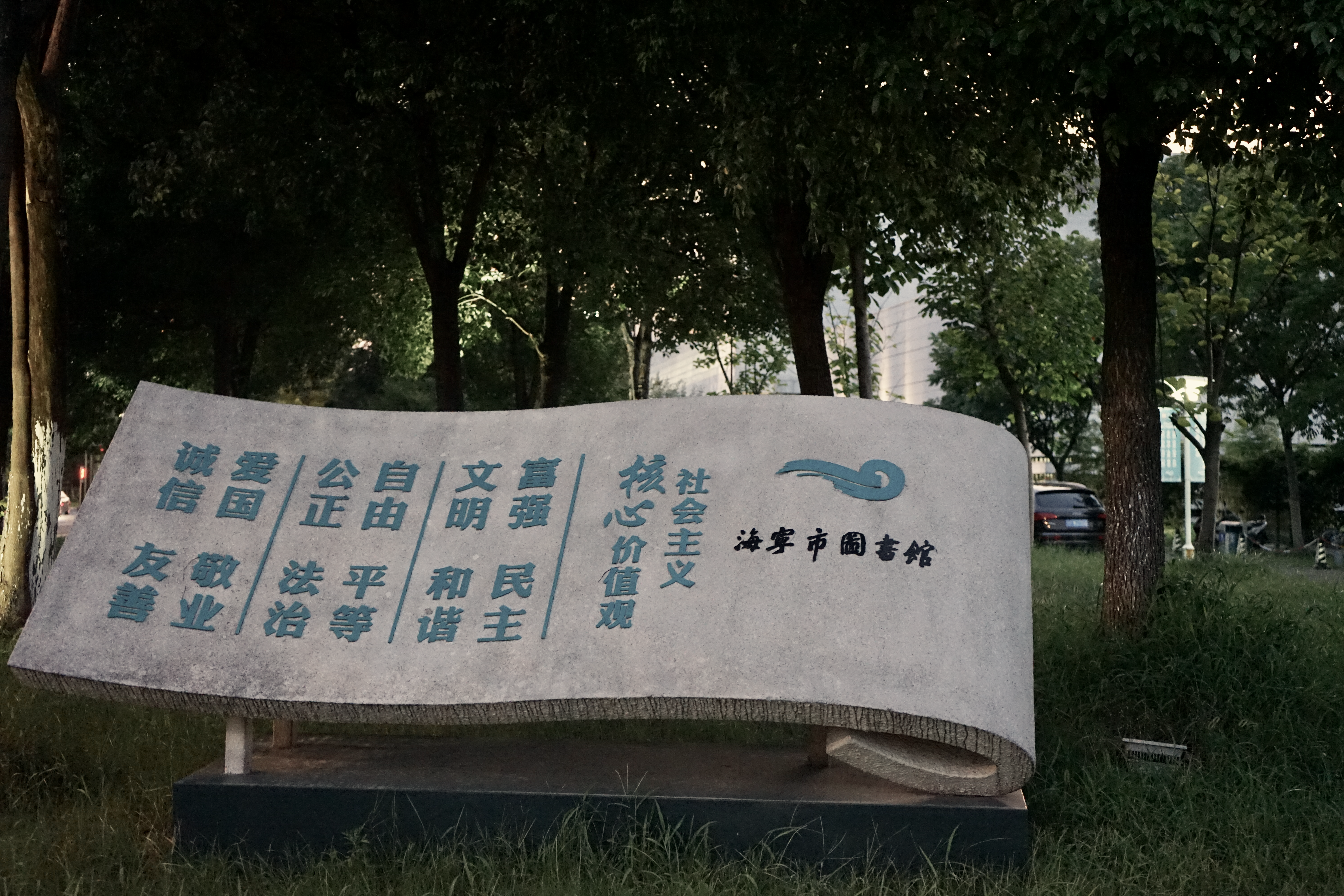 中文（中国大陆）: 海宁图书馆